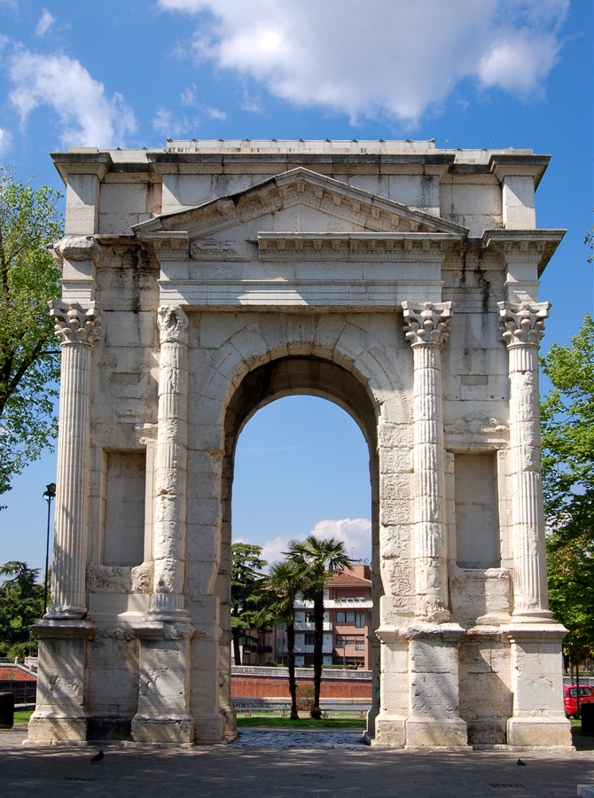 Foto dell'Arco dei Gavi a Verona